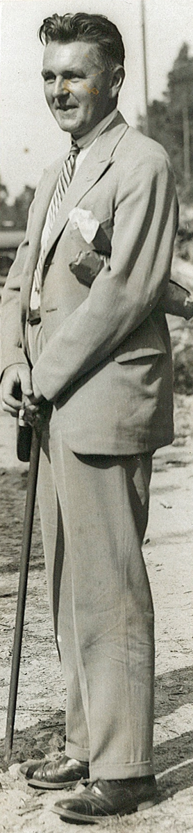 Ole Lind Schistad. Ukjent fotograf, ca. 1935–40. Fra Byhistorisk samling hos Oslo Museum.